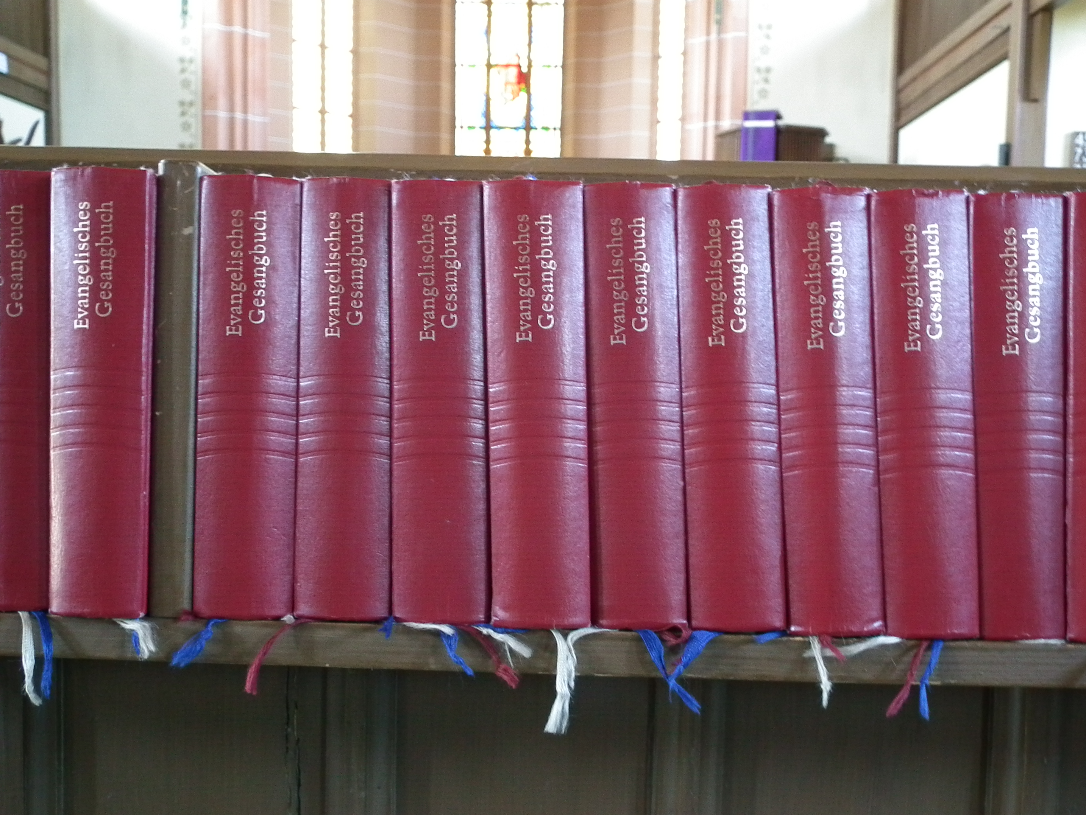 Evangelische Gesangbücher in der Stadtkirche in Ladenburg (Baden-Württemberg, Deutschland)